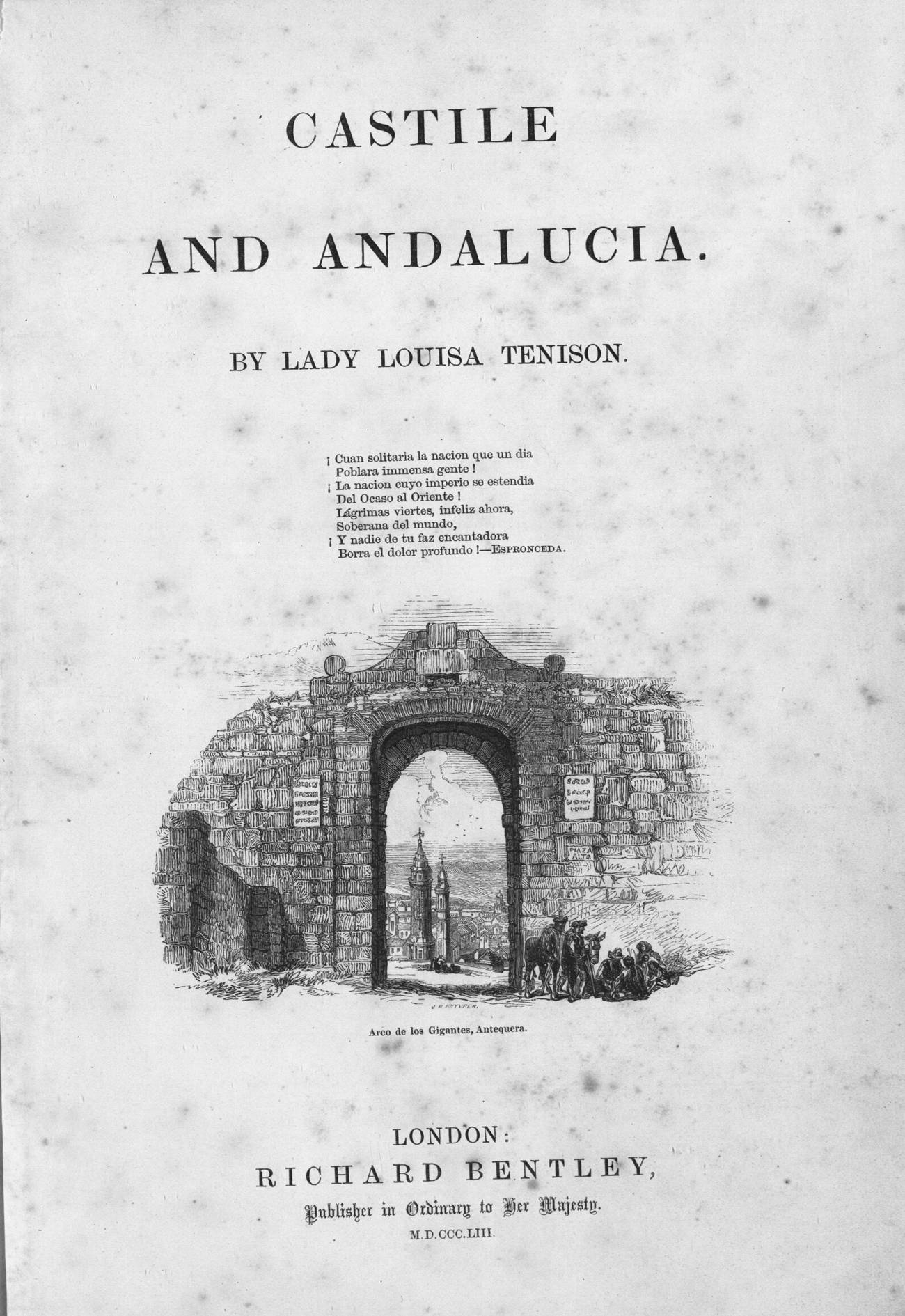 Arco de los Gigantes, Antequera.